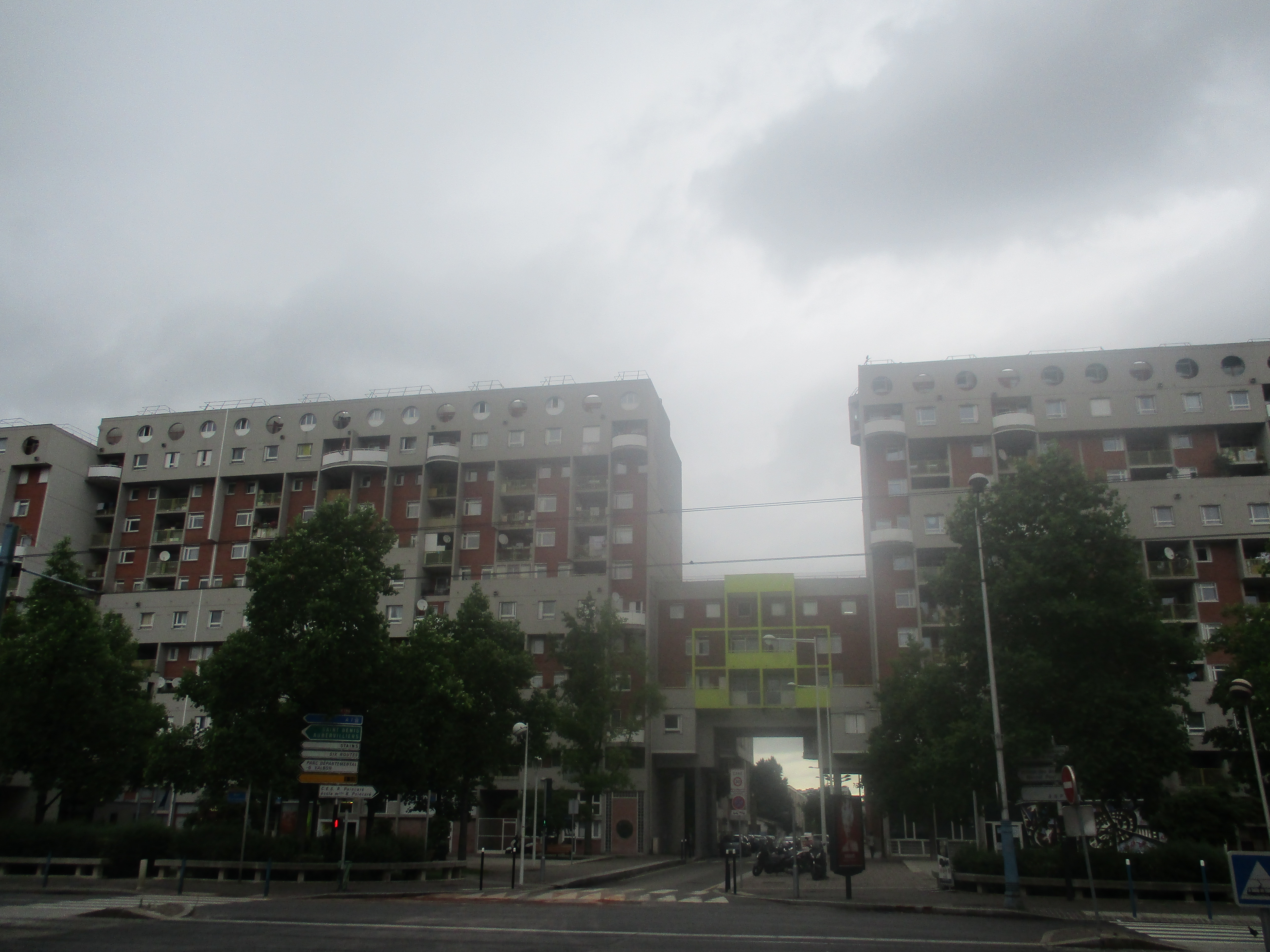 Immeubles avenue Jean Jaurès à La Courneuve (Seine-Saint-Denis).